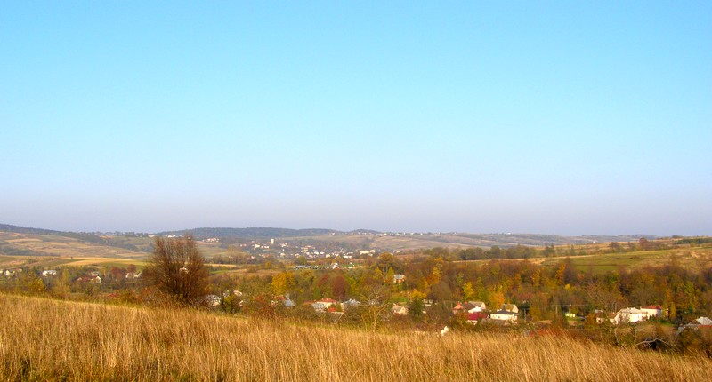 Wieś w województwie Podkarpackim